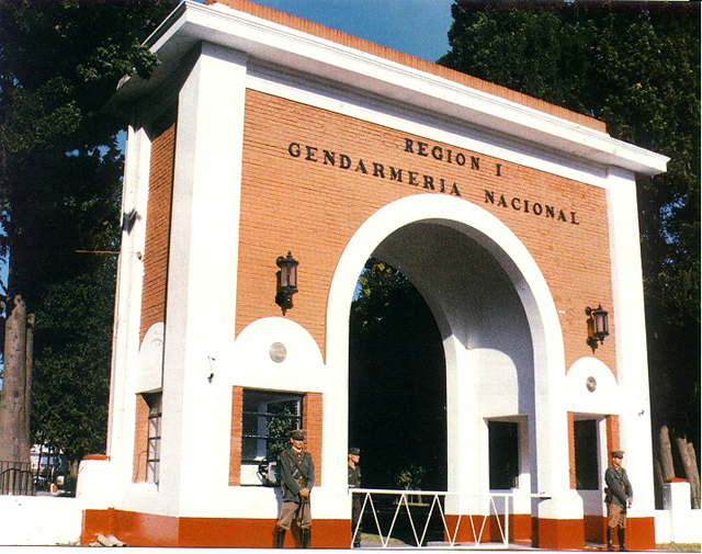 Arco de Triunfo de la Región I en campo de mayo (Buenos Aires)